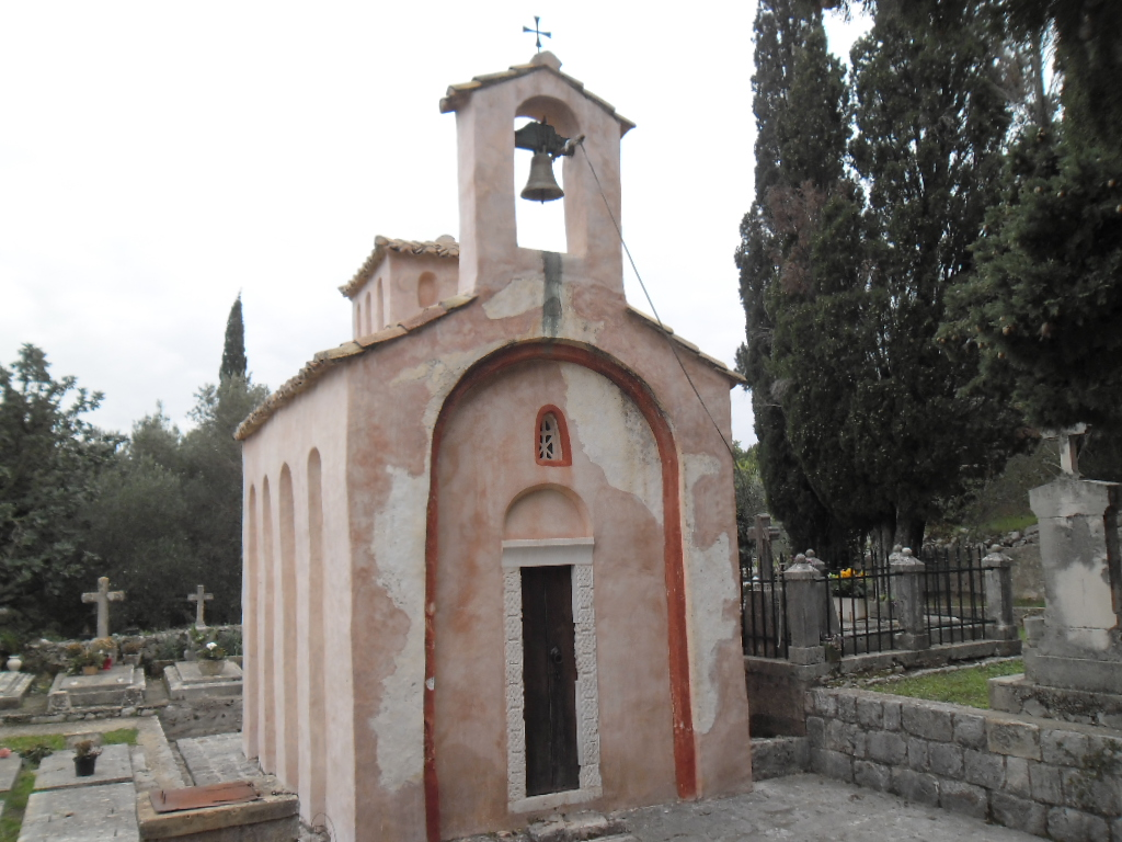 ranosrednjovjekovna Crkva sv. Nikole na groblju na otoku Koločepu